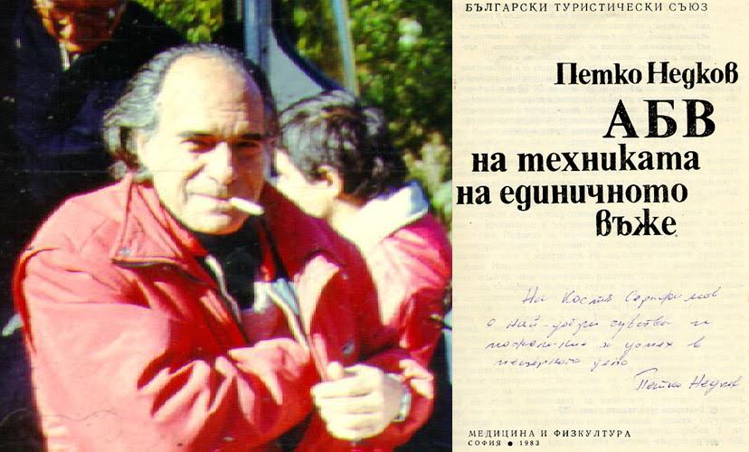 Отсканированная обложка книги, с которой началась популяризация техники одиночной веревки в СССР. Книгу подписал позже, в 1988 году, Петко Недков.